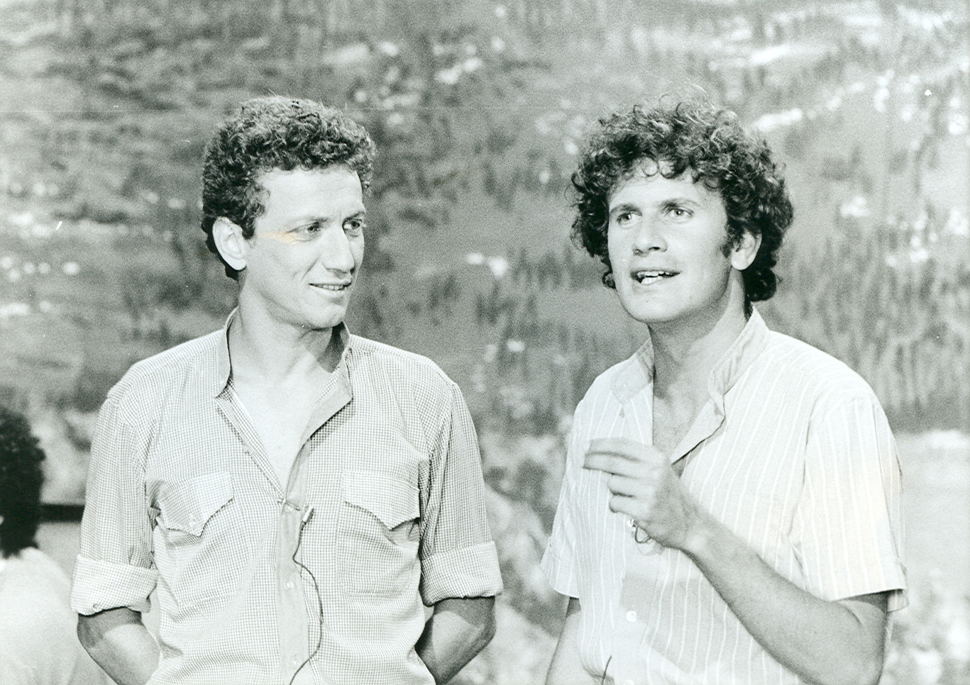 מנחי התוכנית זהו זה! השנים הראשונות מוני מושונוב ודליק ווליניץ